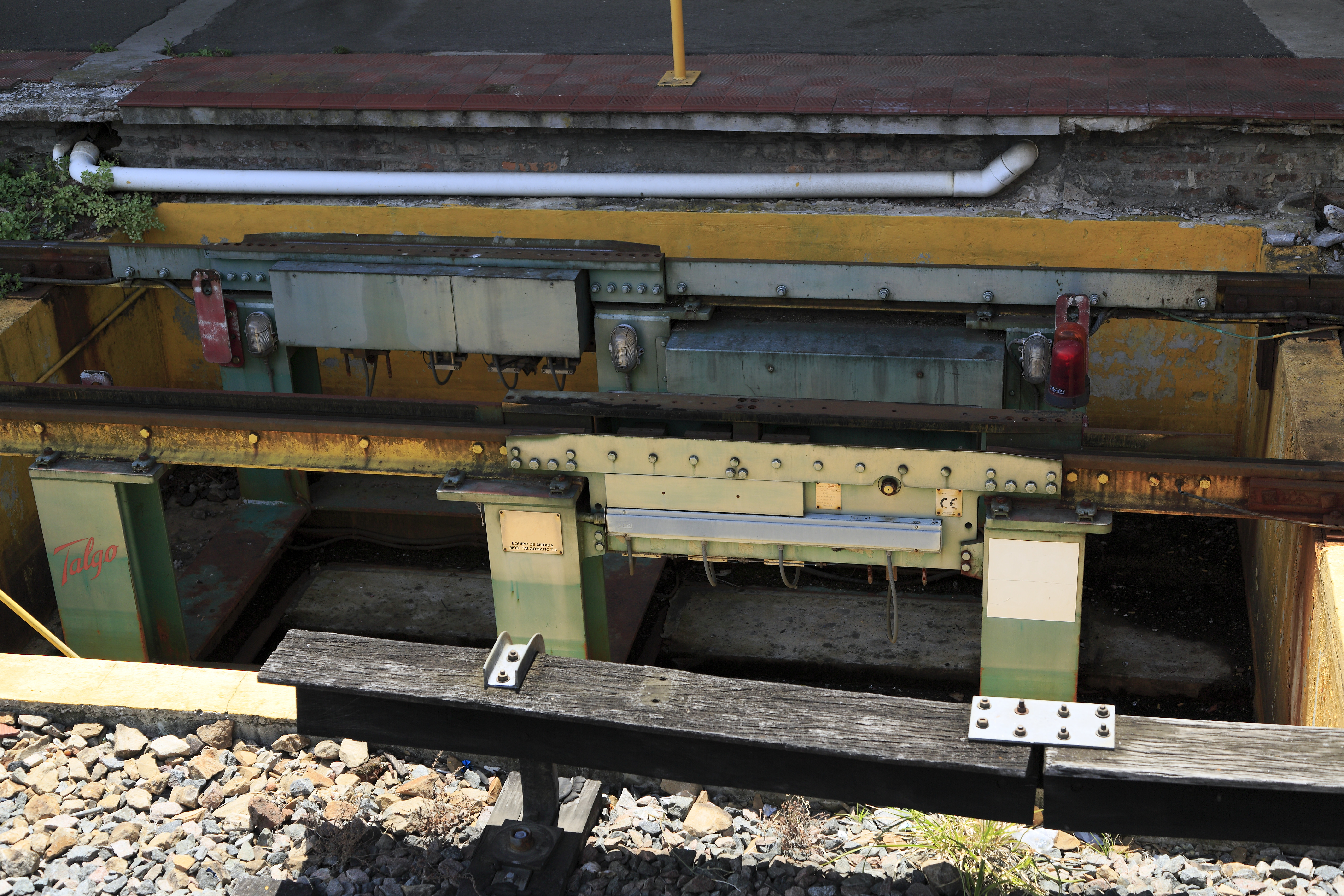 Eingebaut im linken der beiden Fernverkehrsbahnsteiggleise. Der Sinn der von Patentes Talgo gelieferten Anlage an dieser Stelle ist nicht zu erkennen.